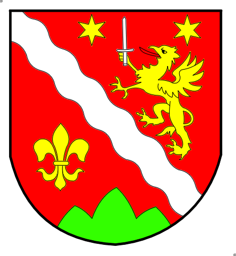 Wappen von Turtmann, Kanton Wallis